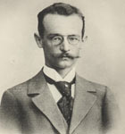 Gustav Trockenbrodt (gestorben 1904), Aschaffenburger Heimatdichter, Foto von 1904 oder älter, Schutzdauer abgelaufen, Public Domain